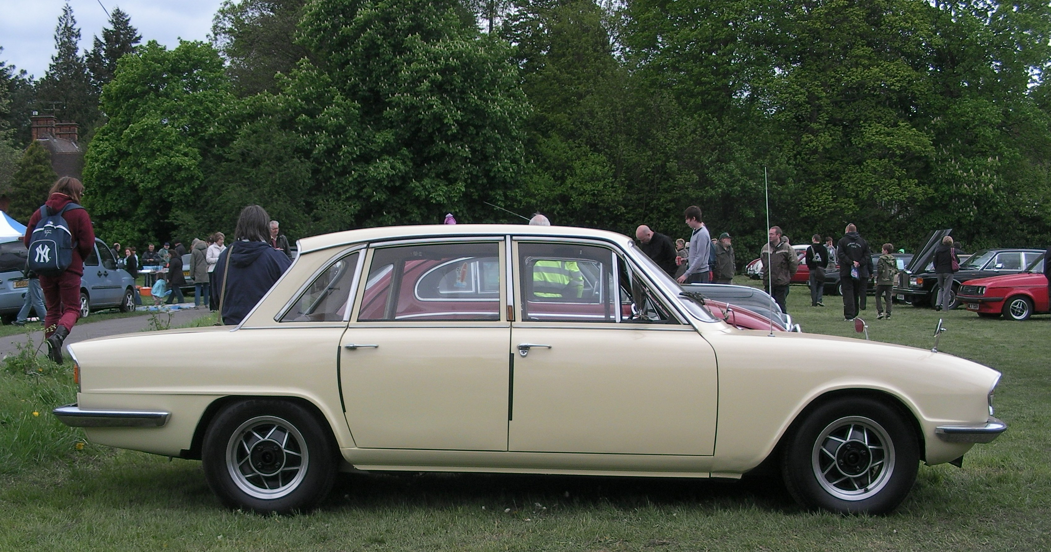 Triumph 2000